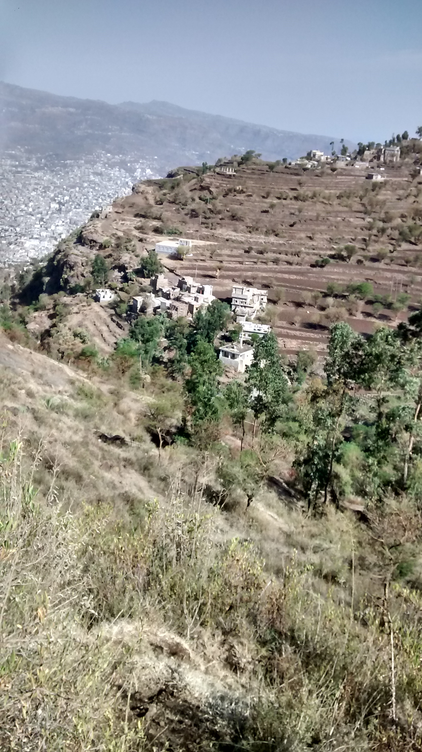 العريف في فصل الشتاء..وتظهر في الصورة اطراف مدينة إب